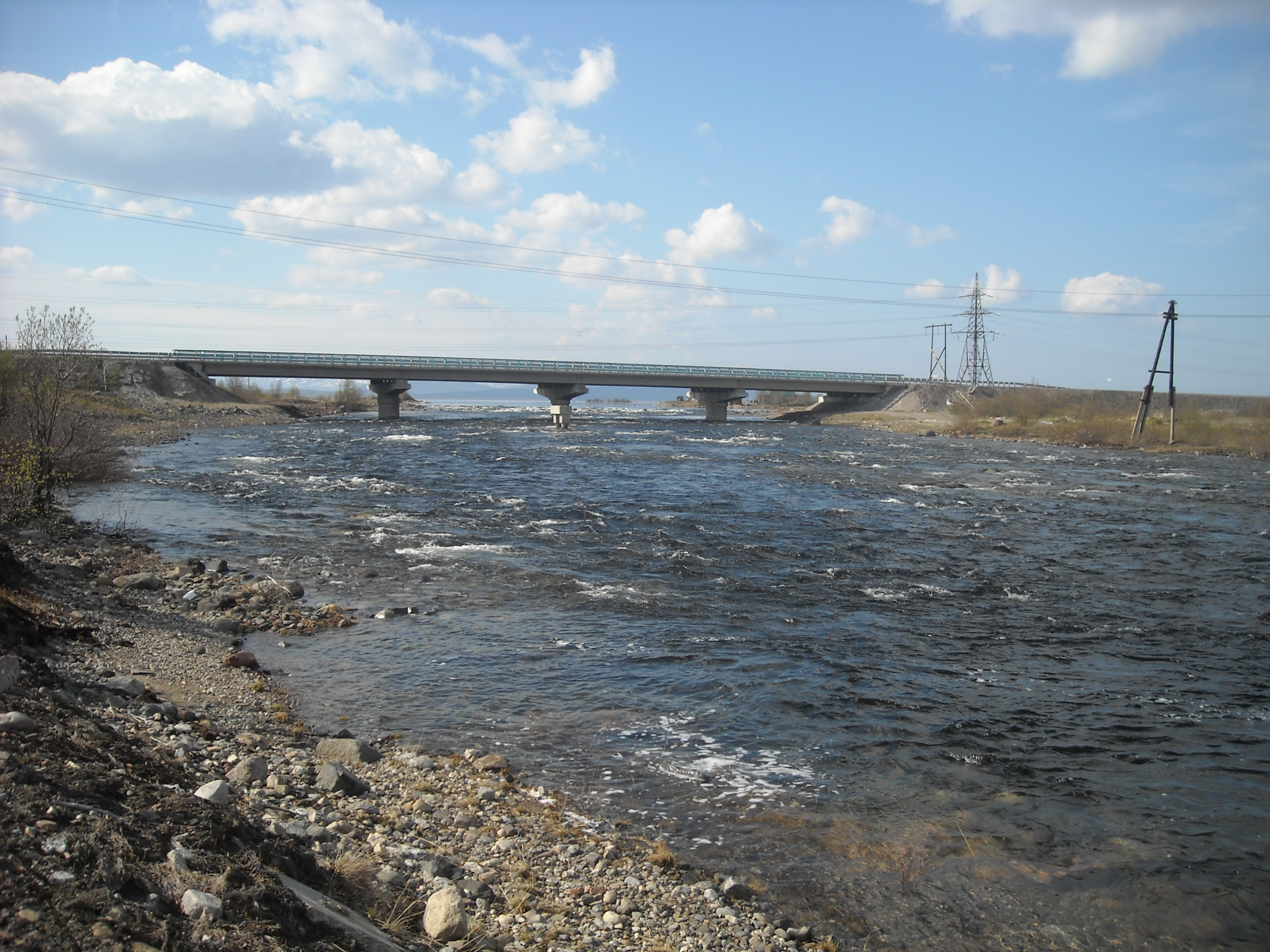 Мост через реку Монча